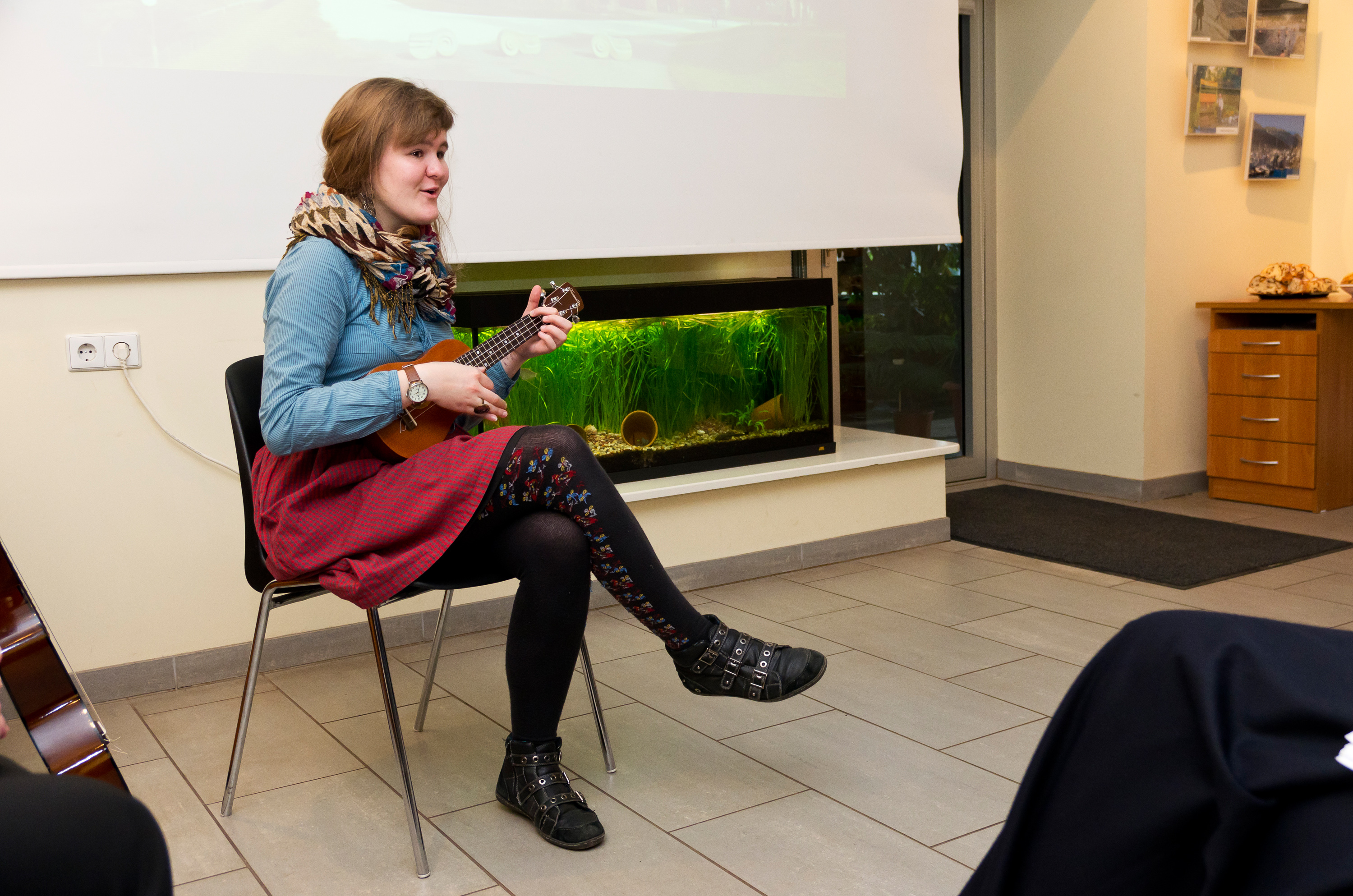 Kultuurimälestised Vikipeediasse 2012 autasustamisüritus. Musitseerib noor interpreet Karoliine-Lisette Kõiv.